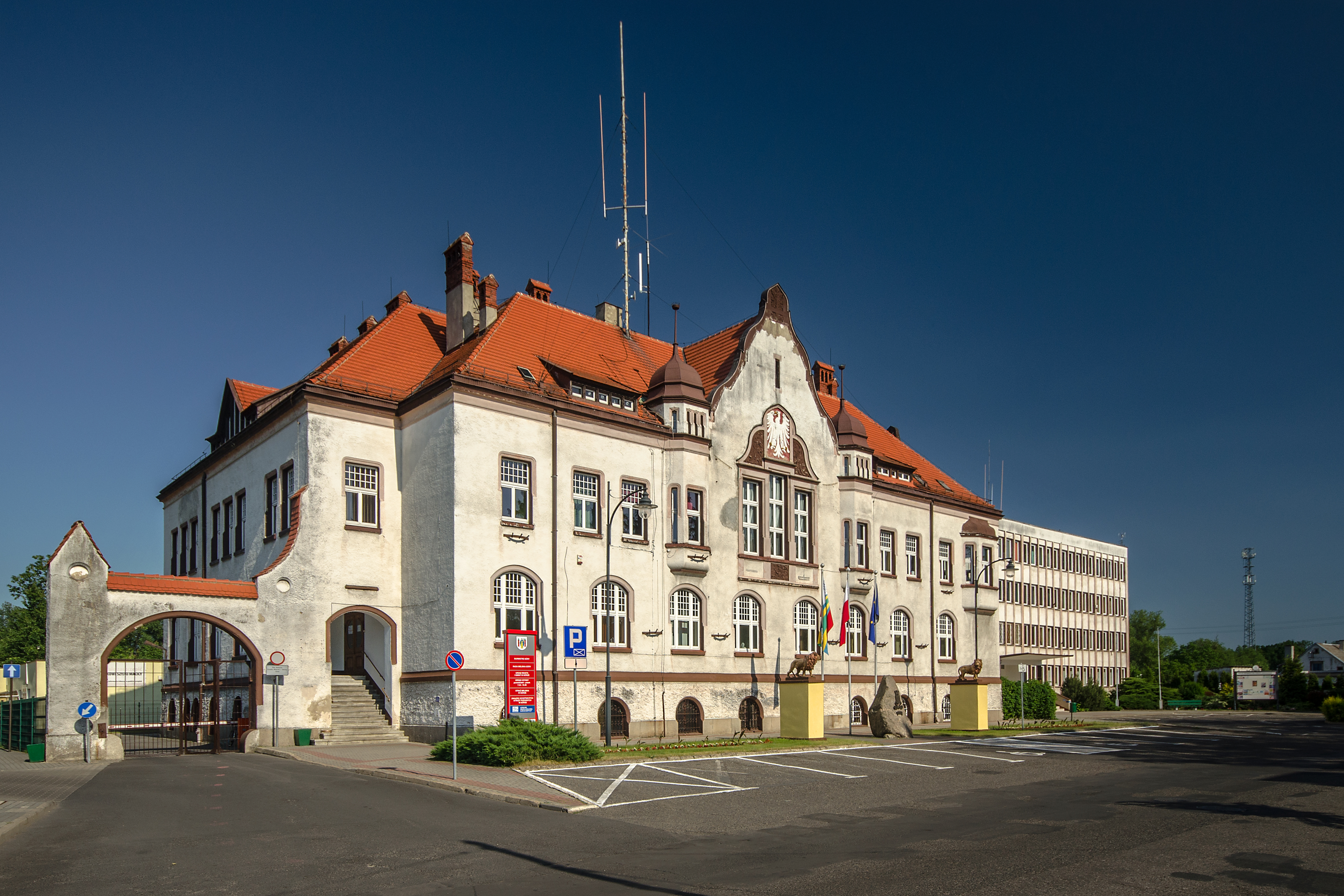 Urząd Miasta i Gminy, ul. Mickiewicza 1, Góra, gm. Góra, pow. górowski, woj. dolnośląskie